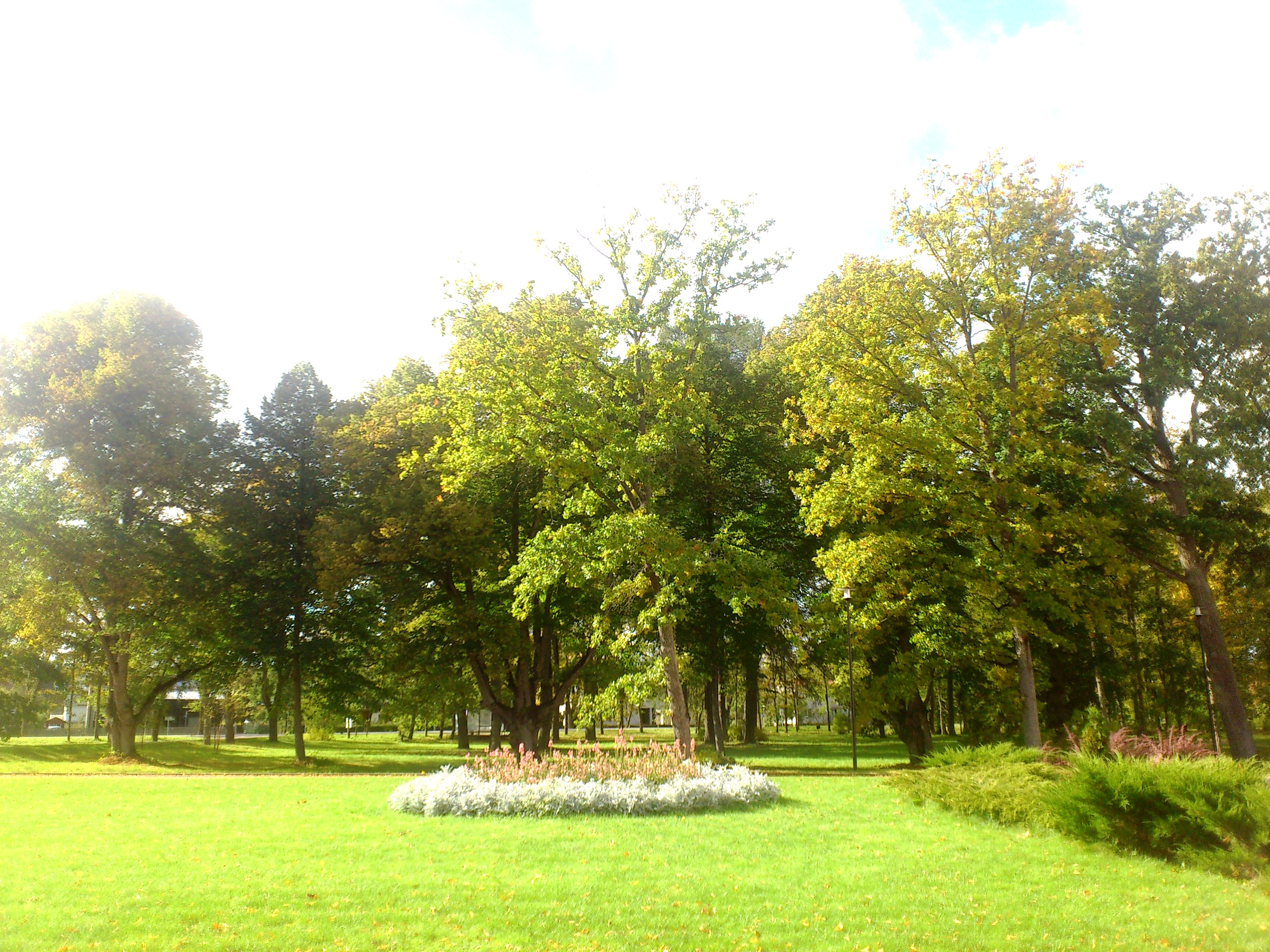 Парк при мызе Тохисоо.